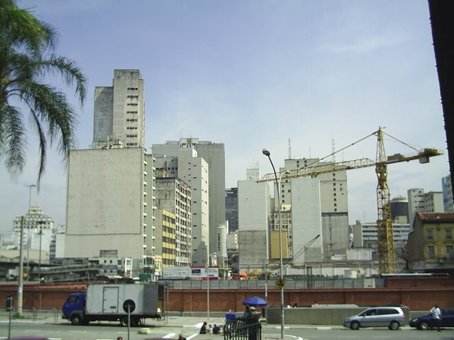 Obras da linha amarela do metrô de São Paulo, ao lado da Estação da Luz.